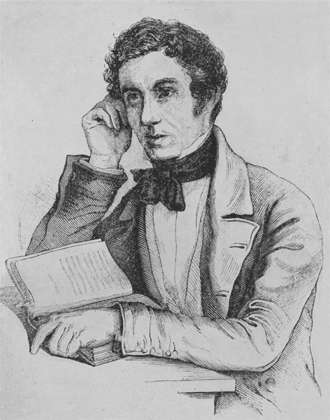 Jakob Stutz (1801–1877), Schwyzer Schriftsteller un Volksdichter. Portrait vu 1848. Erschinen in «Der Eigene», ein Blatt für männliche Kultur, Jahrgang X, Nr.1/2, 1924. Sonderausgabe: "Der freien Schweiz gewidmet". S. 45.